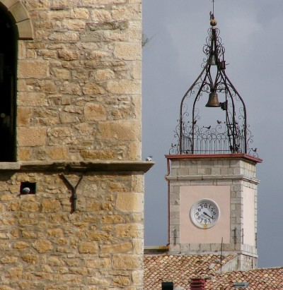 Borrello, Torre dell'Orologio, foto scattata da Angelo Ferrari nel 2002, uso libero